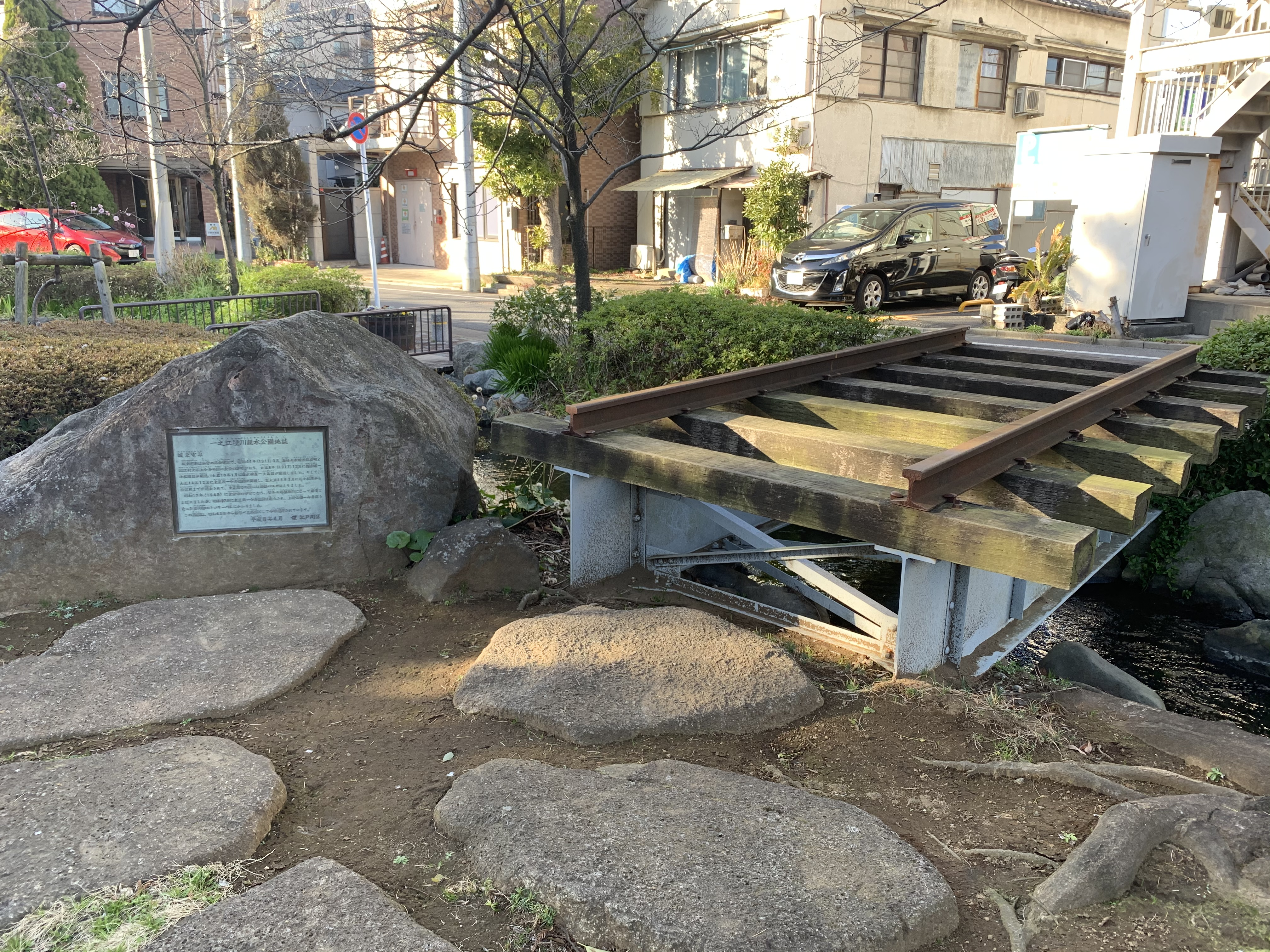 一之江境川親水公園にある旧一之江線の遺構